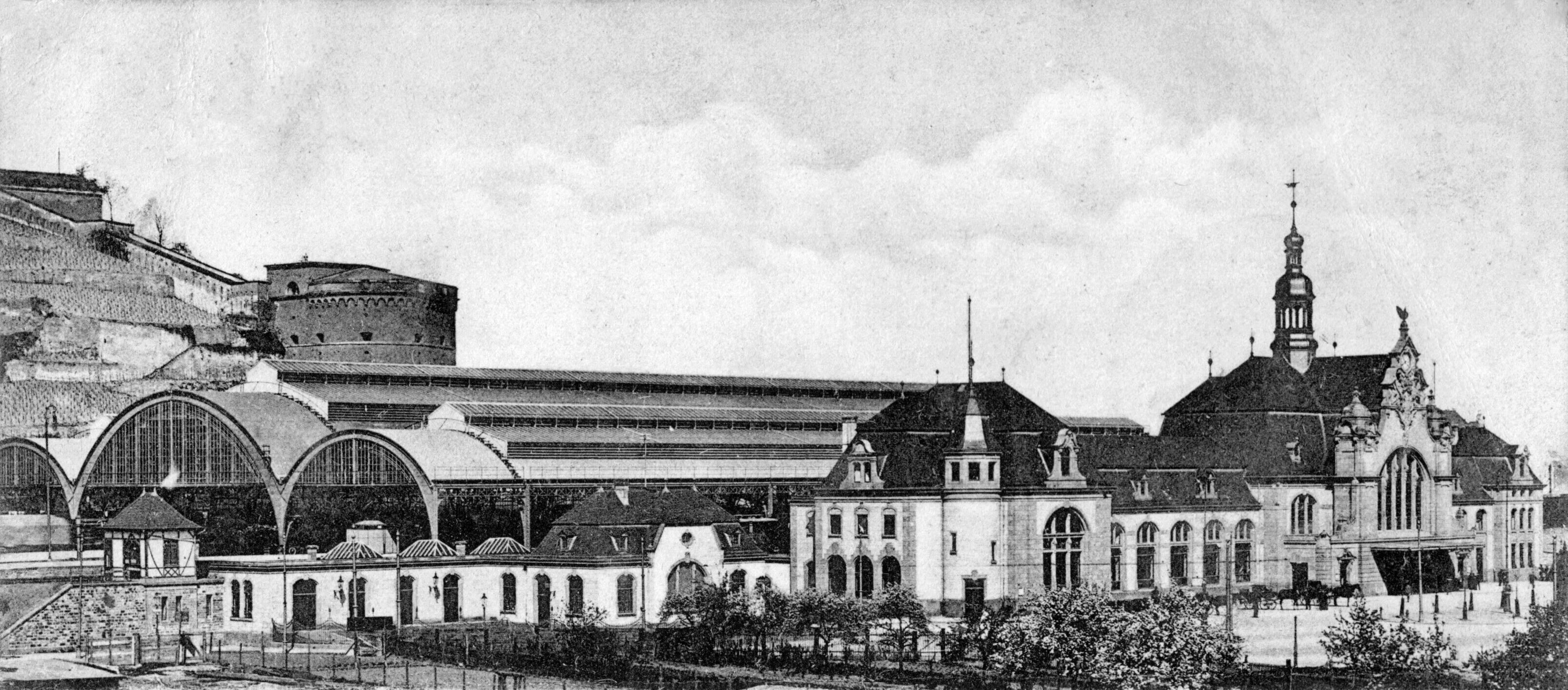 Gesamtansicht des Hauptbahnhofs 1904. Über den Bahnsteigen die Hallenkonstruktion, die nach den Bombenschäden im Zweiten Weltkrieg beseitigt wurde.